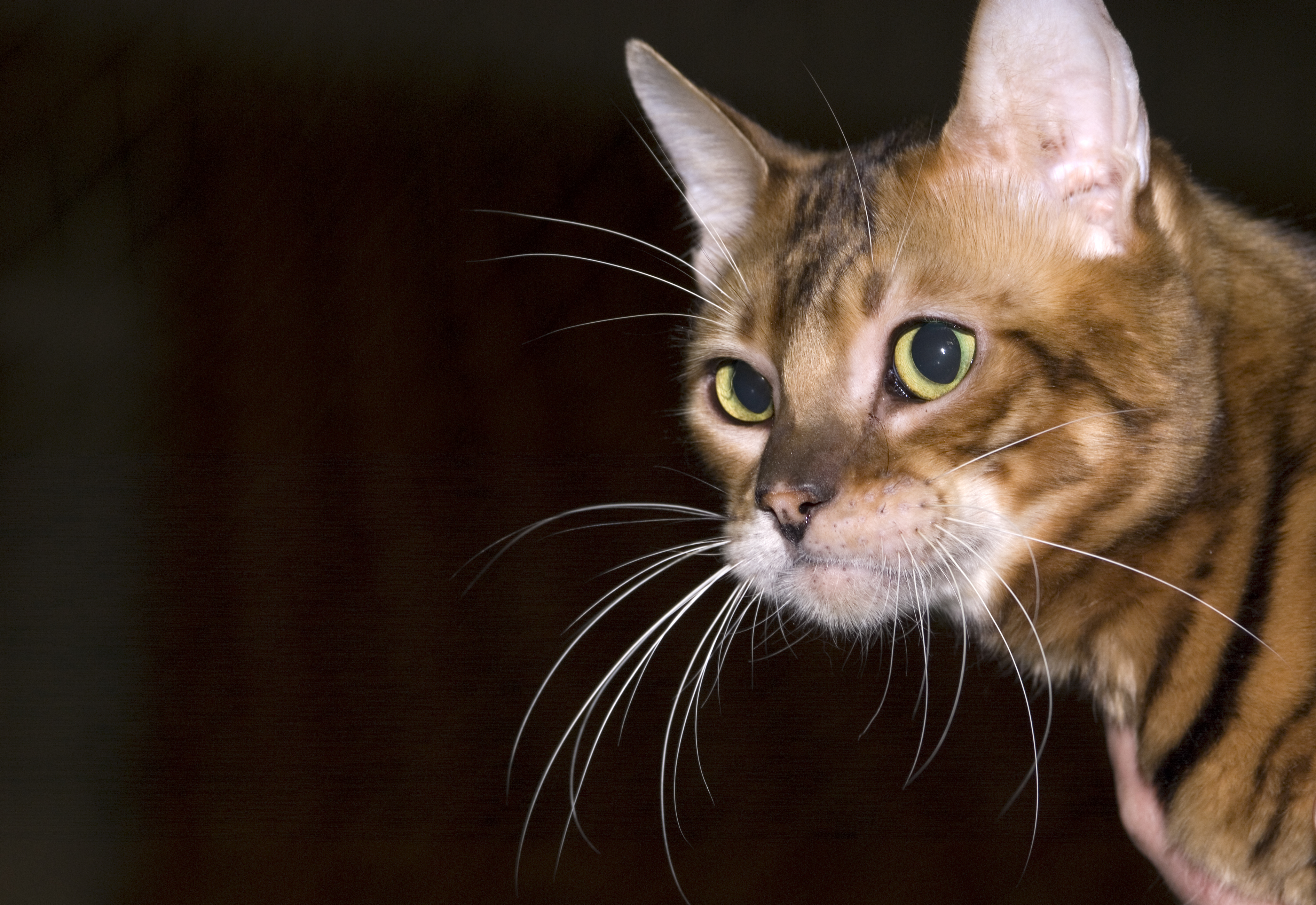 Тойгер Eeyaa American Idol, №1108 по каталогу «Гран При Royal Canin». Кот. Окрас: чёрный тигровый (TGR n 23). Дата рождения: 09/09/2007. Владелец: Л.Назалина. Клуб «Алиса-Бест», Москва